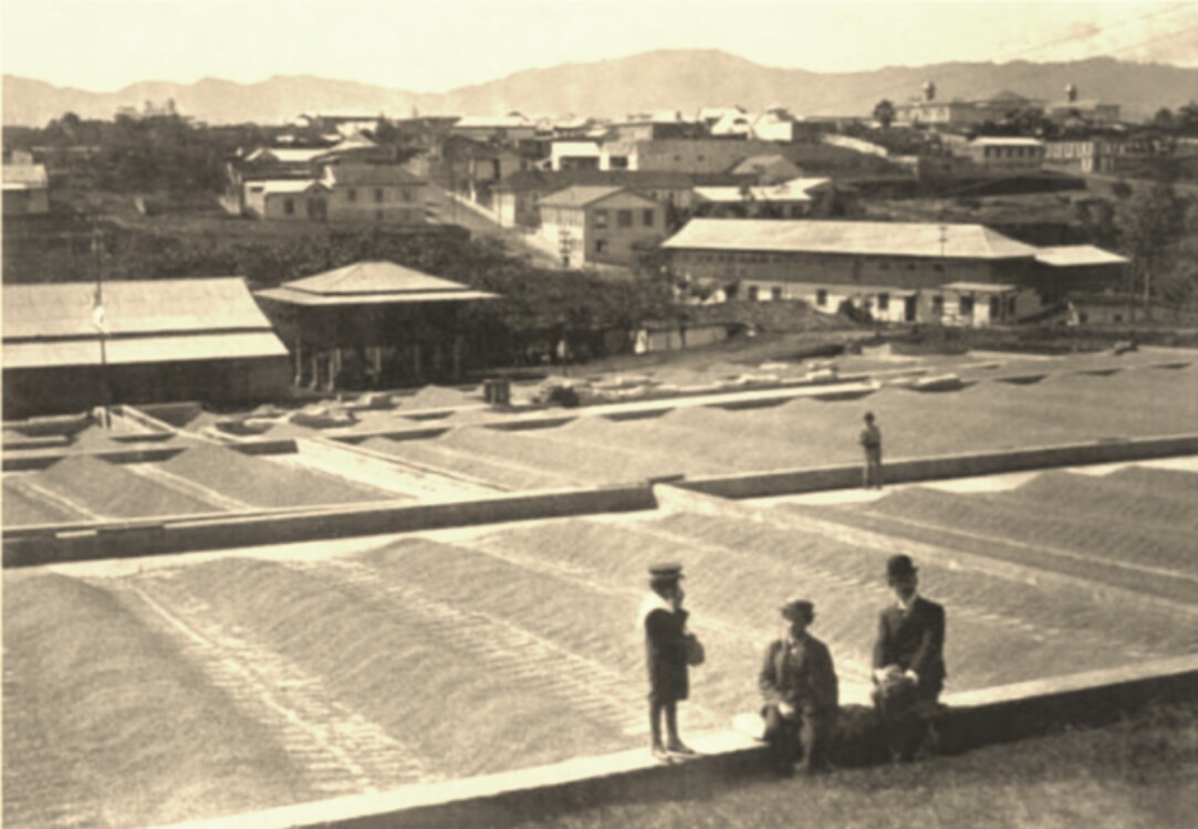 Fotografía del Barrio Amón desde el Beneficio Tournón. San José, Costa Rica